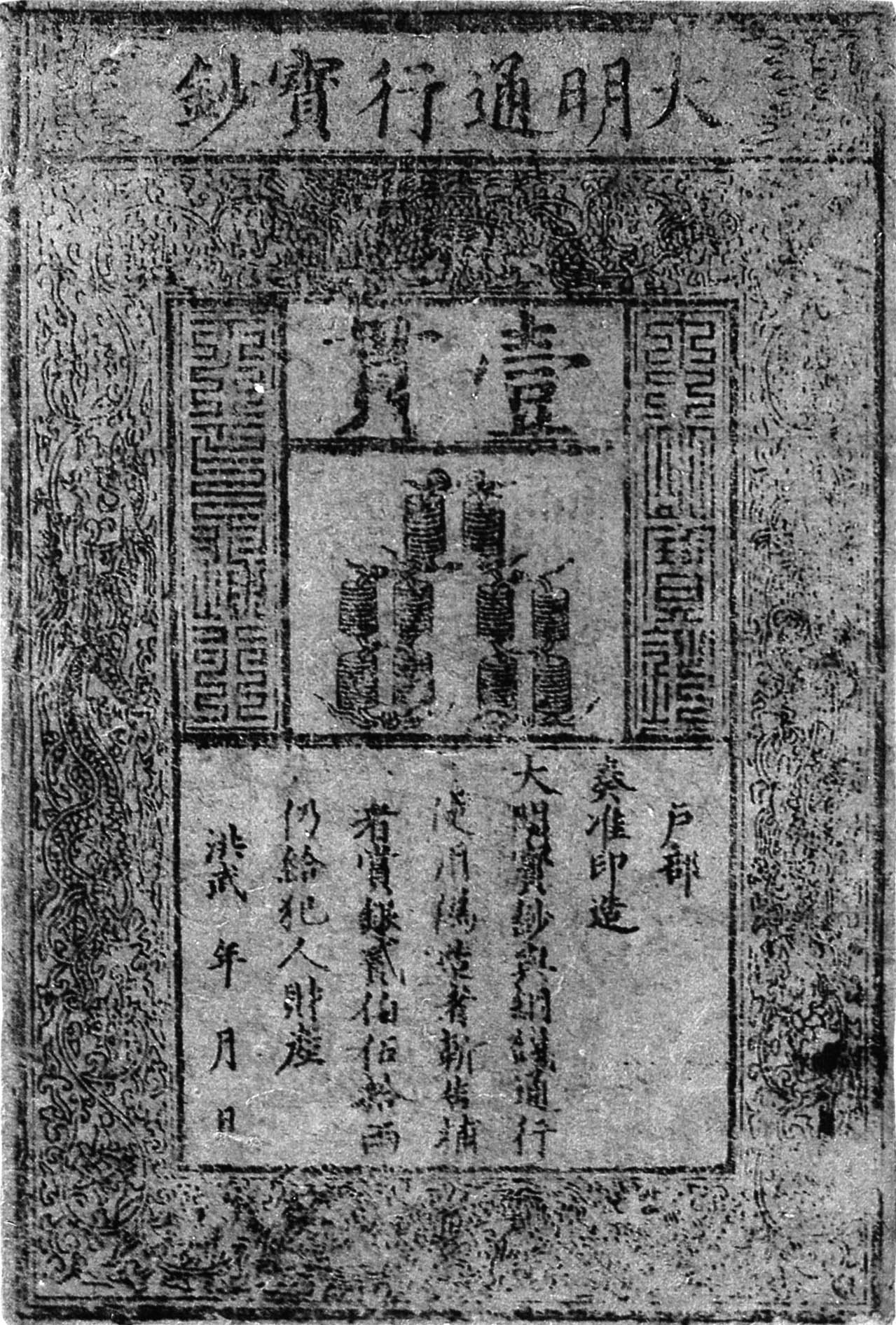 大明宝钞